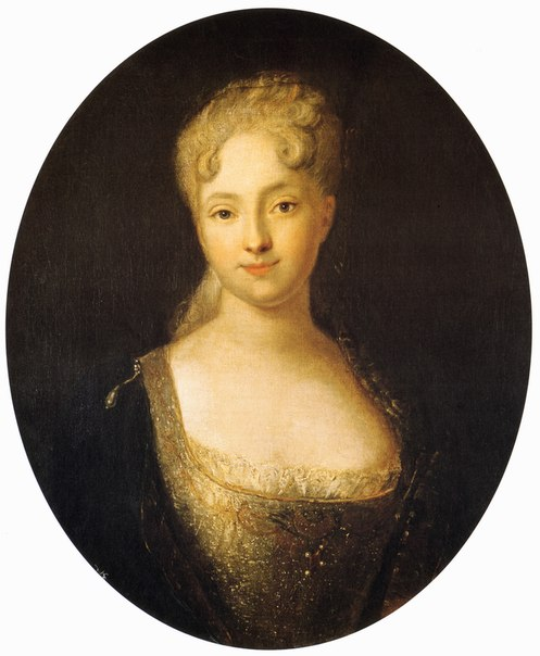 Екатерина Алексеевна Долгорукова